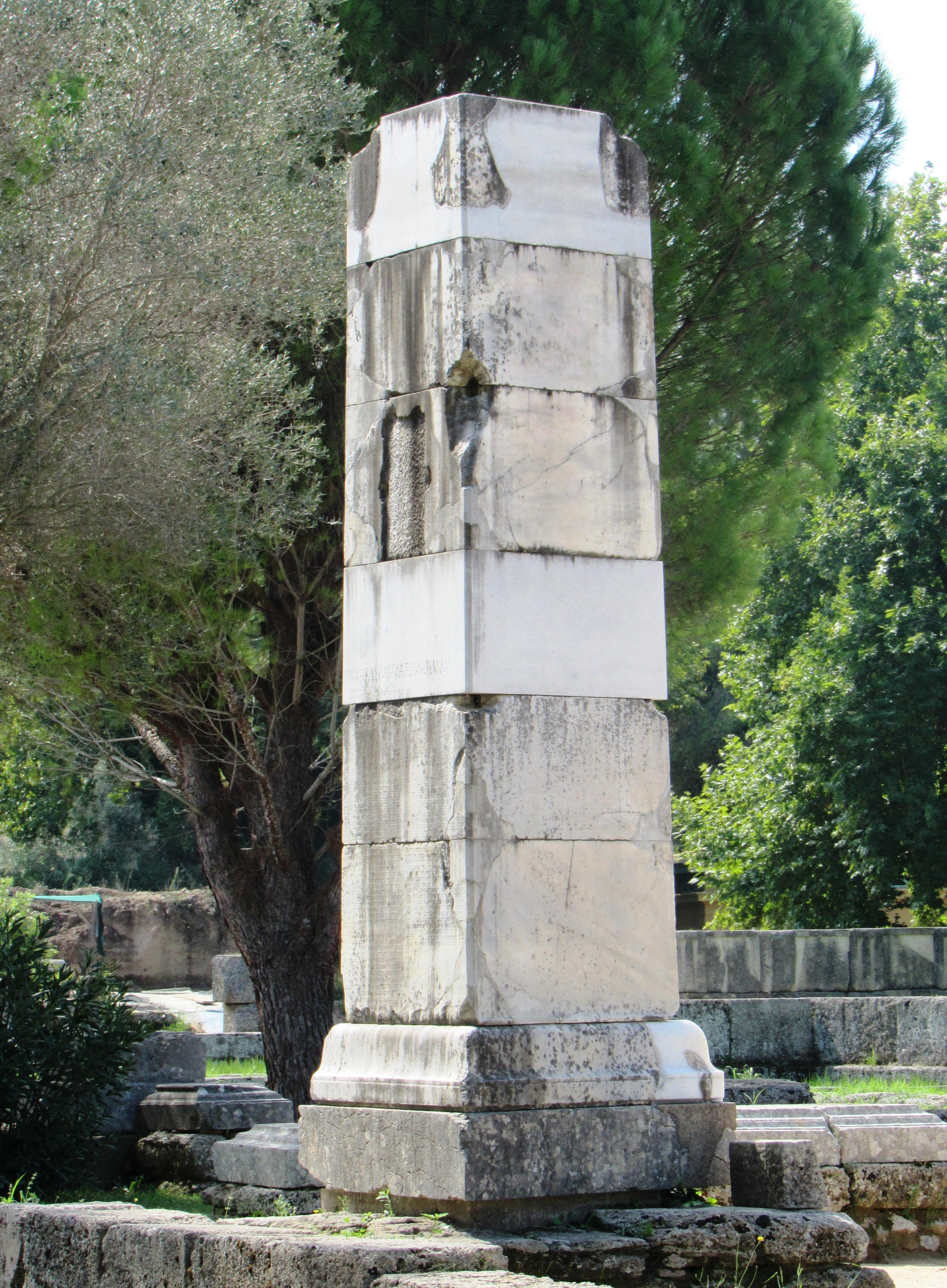 Βάθρο της Νίκης του Παιωνίου στην ανατολική πλευρά του Ναού του Δία στην Αρχαία Ολυμπία«Βάθρο της Νίκης του Παιωνίου»